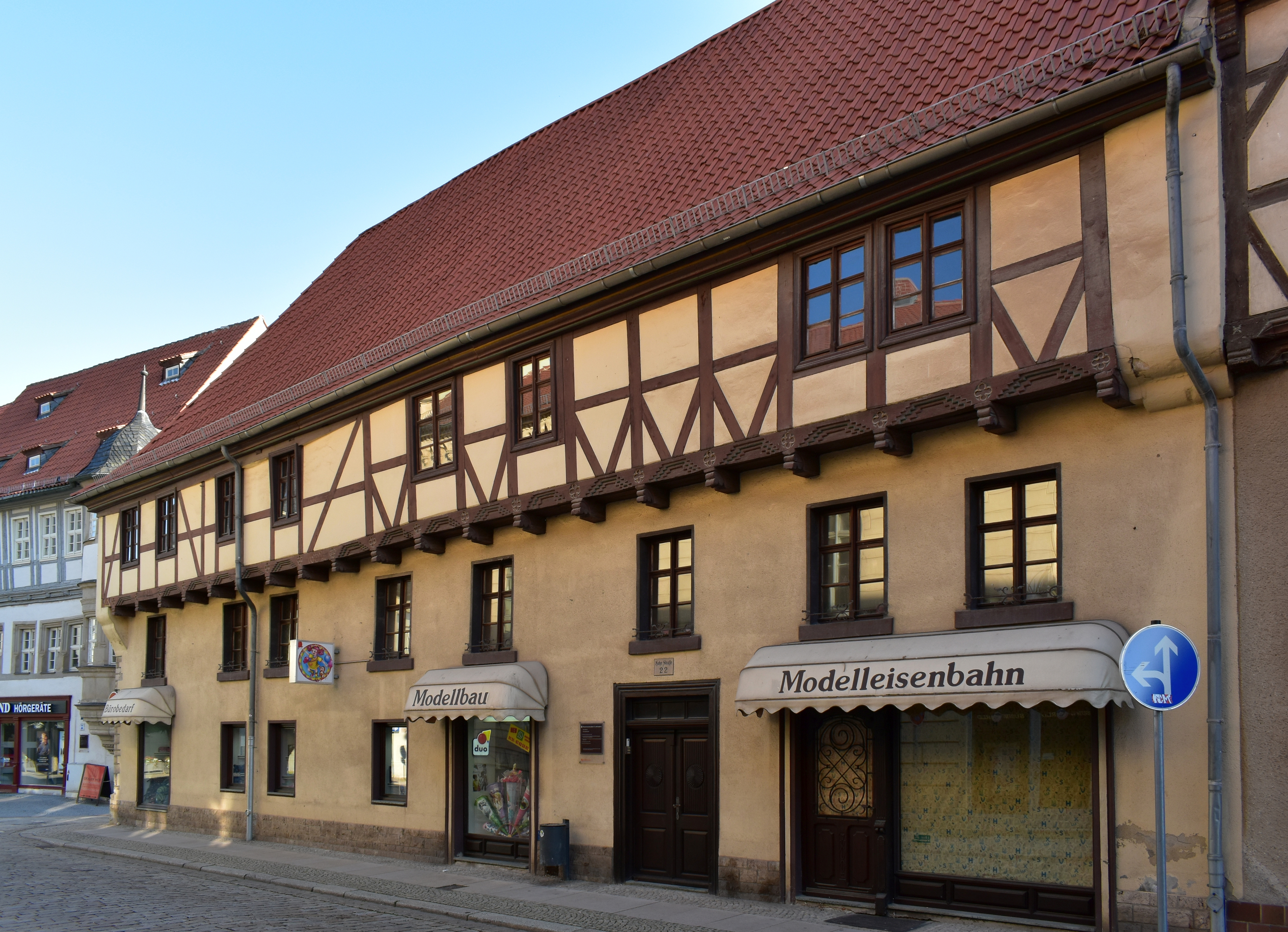 Gebäude Hohe Straße 22 in Aschersleben